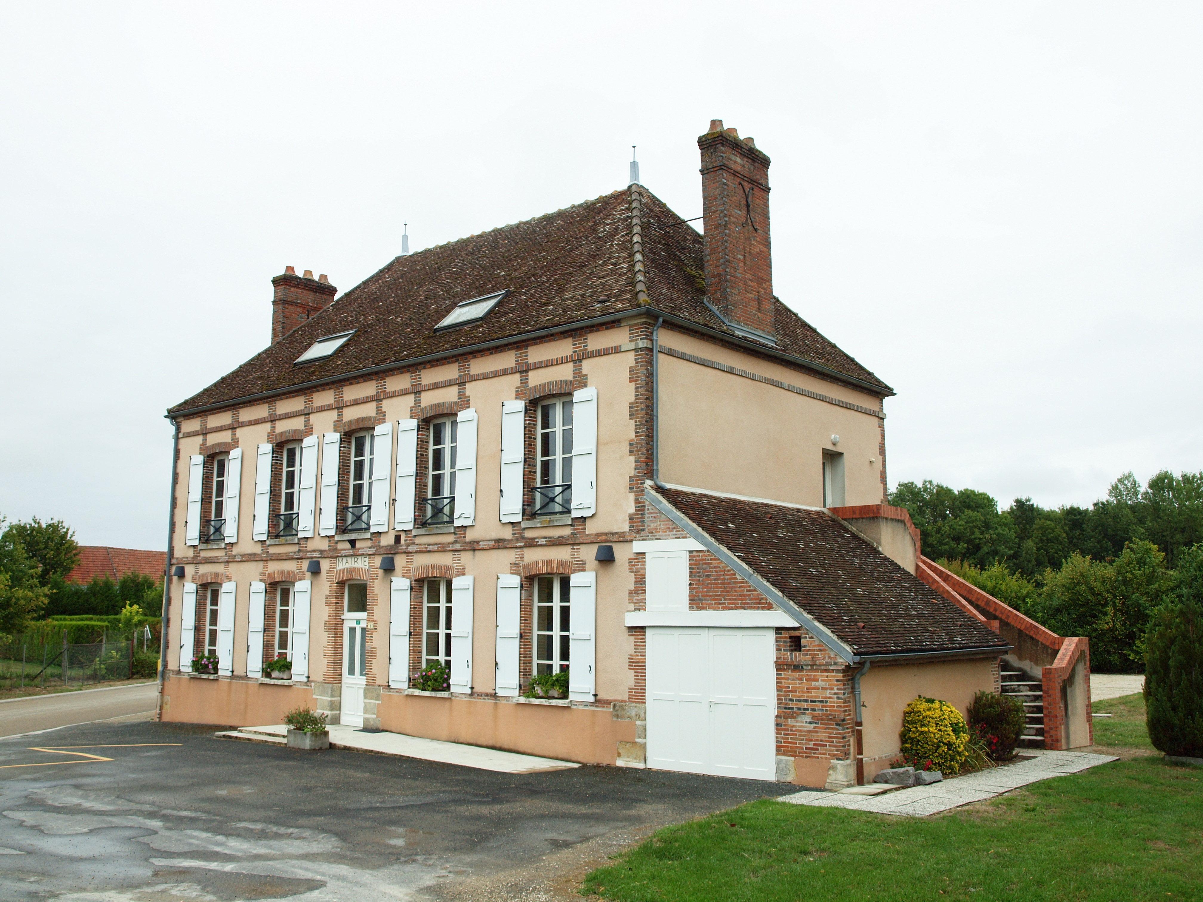 Villeneuve-Saint-Vistre-et-Villevotte (Marne, France) ; la mairie.